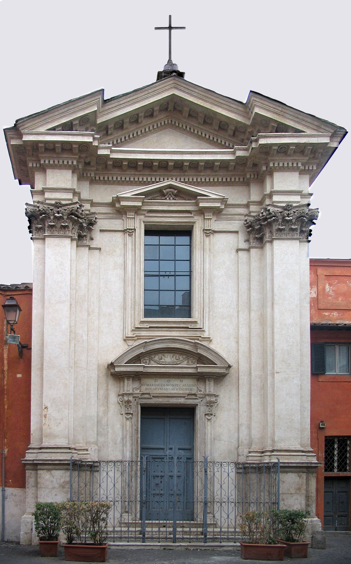 Church of Sant'Egidio in Rome